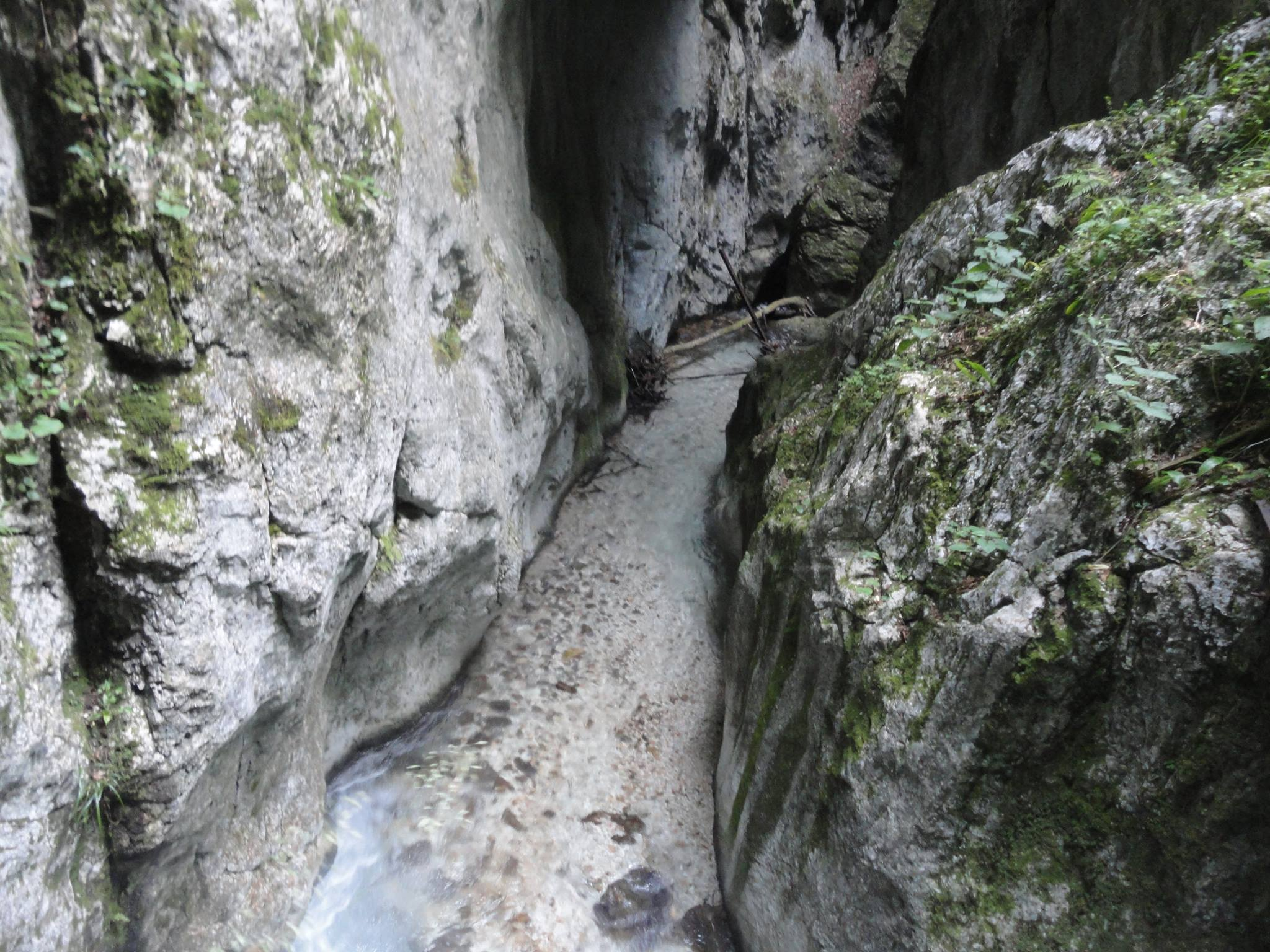 Fiume Tenna all'Interno della gola dell'Infernaccio